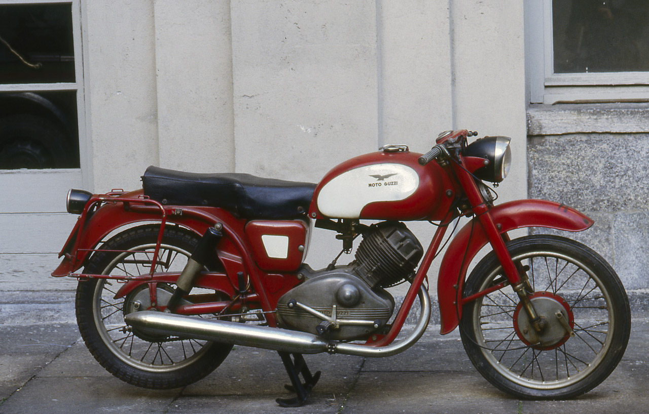 Motocicletta con telaio tubolare a doppia culla e in lamiera stampata, parafanghi e serbatoio verniciati di rosso; il serbatoio presenta inoltre parti verniciate in bianco. Al centro del telaio è montato un motore monocilindrico inclinato a quattro tempi, con valvole in testa comandate da un albero a camme; il tubo di scarico è posto sul fianco destro del veicolo. Al di sopra del motore è collocato il serbatoio della benzina. Dietro al serbatoio si trova la sella lunga. Il cambio a quattro velocità è comandato dal pedale a bilanciere posto sul lato destro. Sul tappo del cannotto dello sterzo è sistemato il quadrante del tachimetro con scala numerata da 0 a 120 km/h. La motocicletta è provvista di fanale anteriore e fanalino di coda, con comando di accensione posizionato sul manubrio. La ruota anteriore è collegata mediante forcella telescopica, mentre la sospensione posteriore utilizza un forcellone oscillante, con ammortizzatori idraulici regolabili. La motocicletta è provvista di freni a tamburo, con comando sul manubrio per il freno anteriore e a pedale per quello posteriore. Notizie storico-critiche La Lodola fu l'ultima motocicletta progettata da Carlo Guzzi; venne presentata nell'aprile 1956 alla Fiera di Milano con un modello 175 di cilindrata, cui si aggiunse nel 1960 una versione da 235 di cilindrata. Pur rimanendo in produzione fino al 1966, questo modello non riuscì ad ottenere un ampio successo di pubblico. Rispetto alla precedente produzione Moto Guzzi, questa motocicletta presentava un motore inclinato di 45° e non più orizzontale, con un albero a camme per la distribuzione. In base al numero di targa, è possibile datare l'immatricolazione dell'esemplare posseduto dal Museo Nazionale della Scienza e della Tecnologia "Leonardo da Vinci" al 1958.